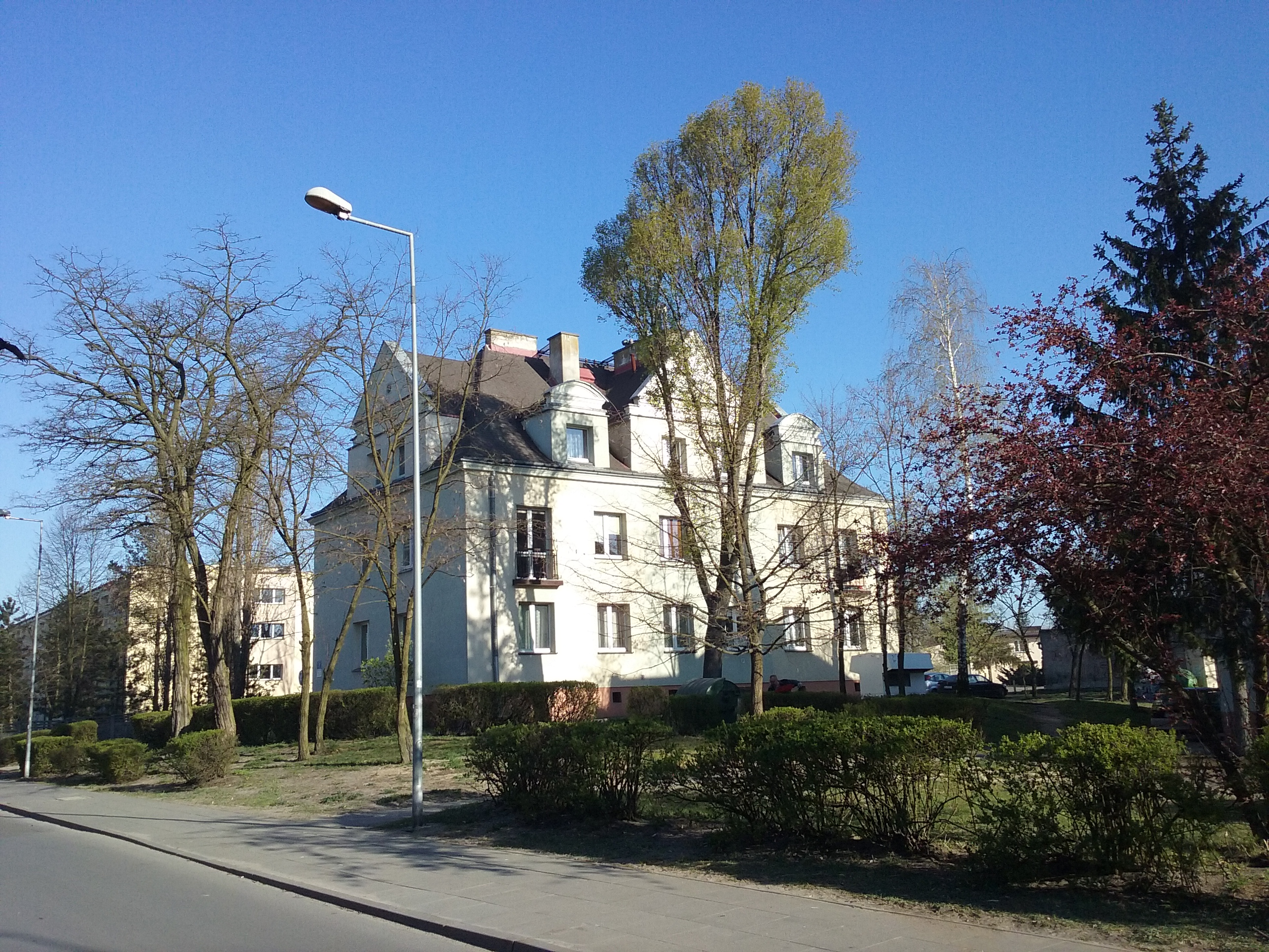 Tomaszów Mazowiecki w województwie łódzkim, PL, EU. Jeden z przedwojennych budynków mieszkalnych wybudowanych przez Tomaszowską Fabrykę Sztucznego Jedwabiu (później Wistom), na Michałówku, CC0